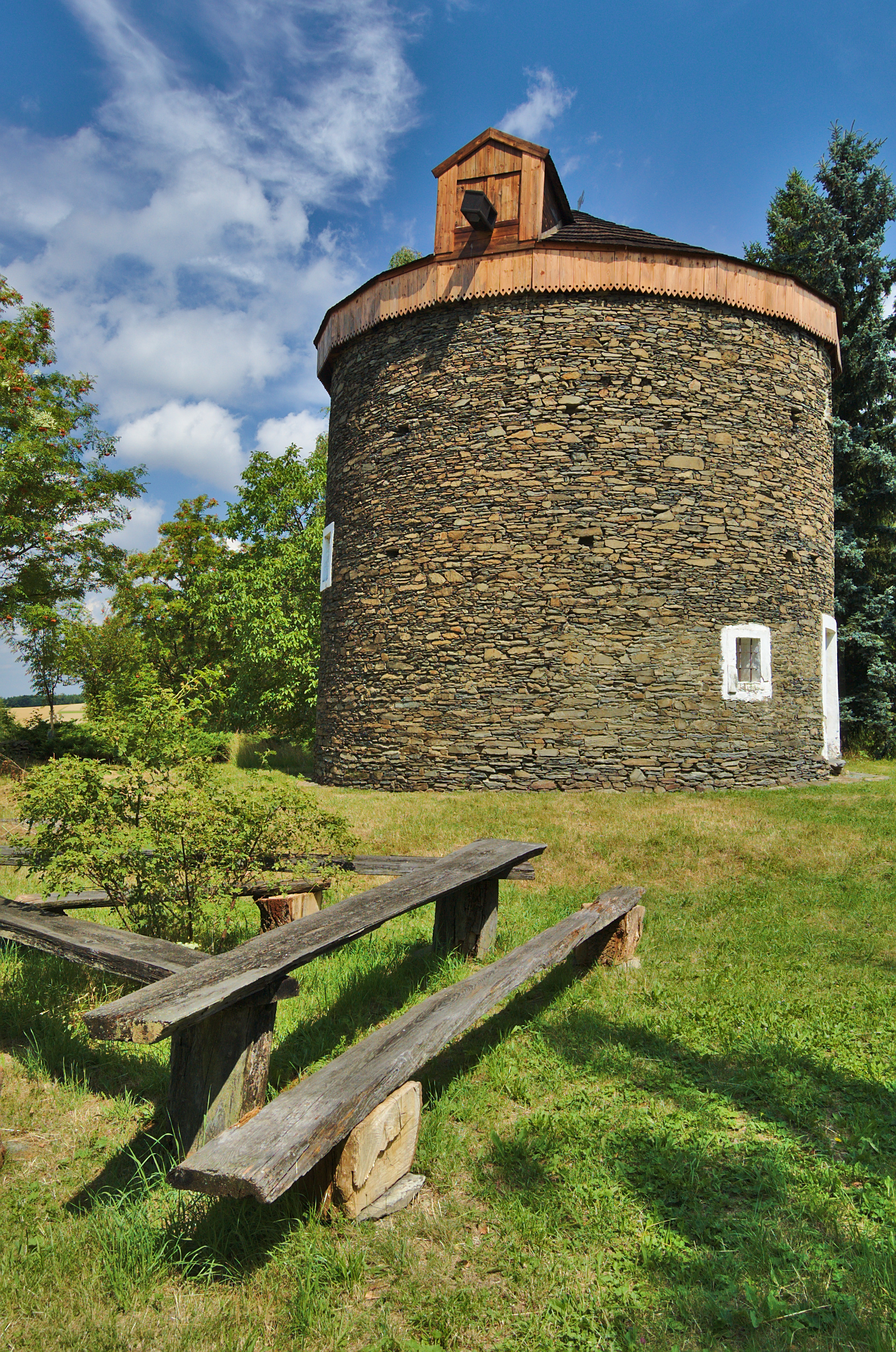 Větrný mlýn, Kořenec, okres Blansko